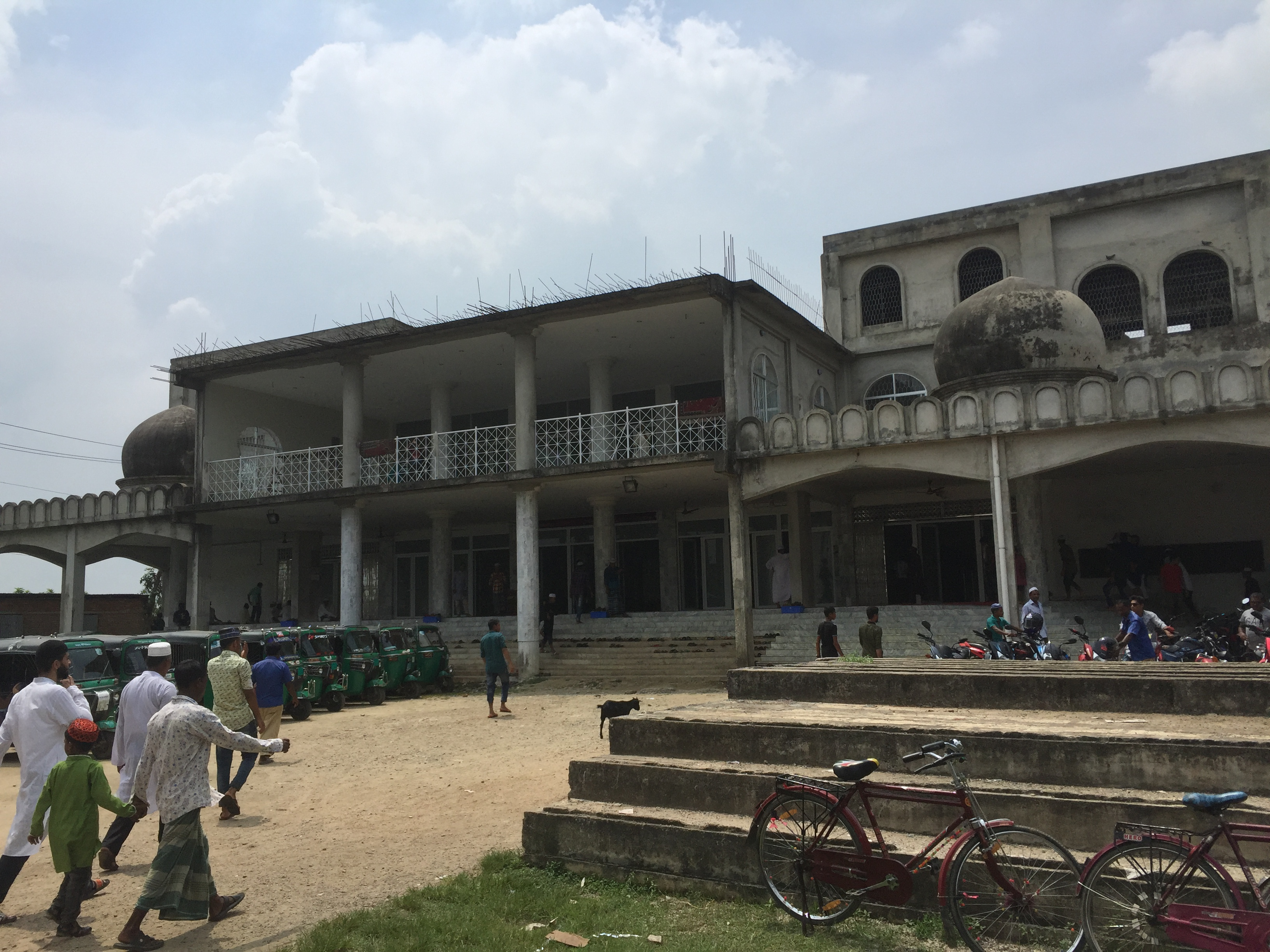 রবির বাজার জামে মসজিদ